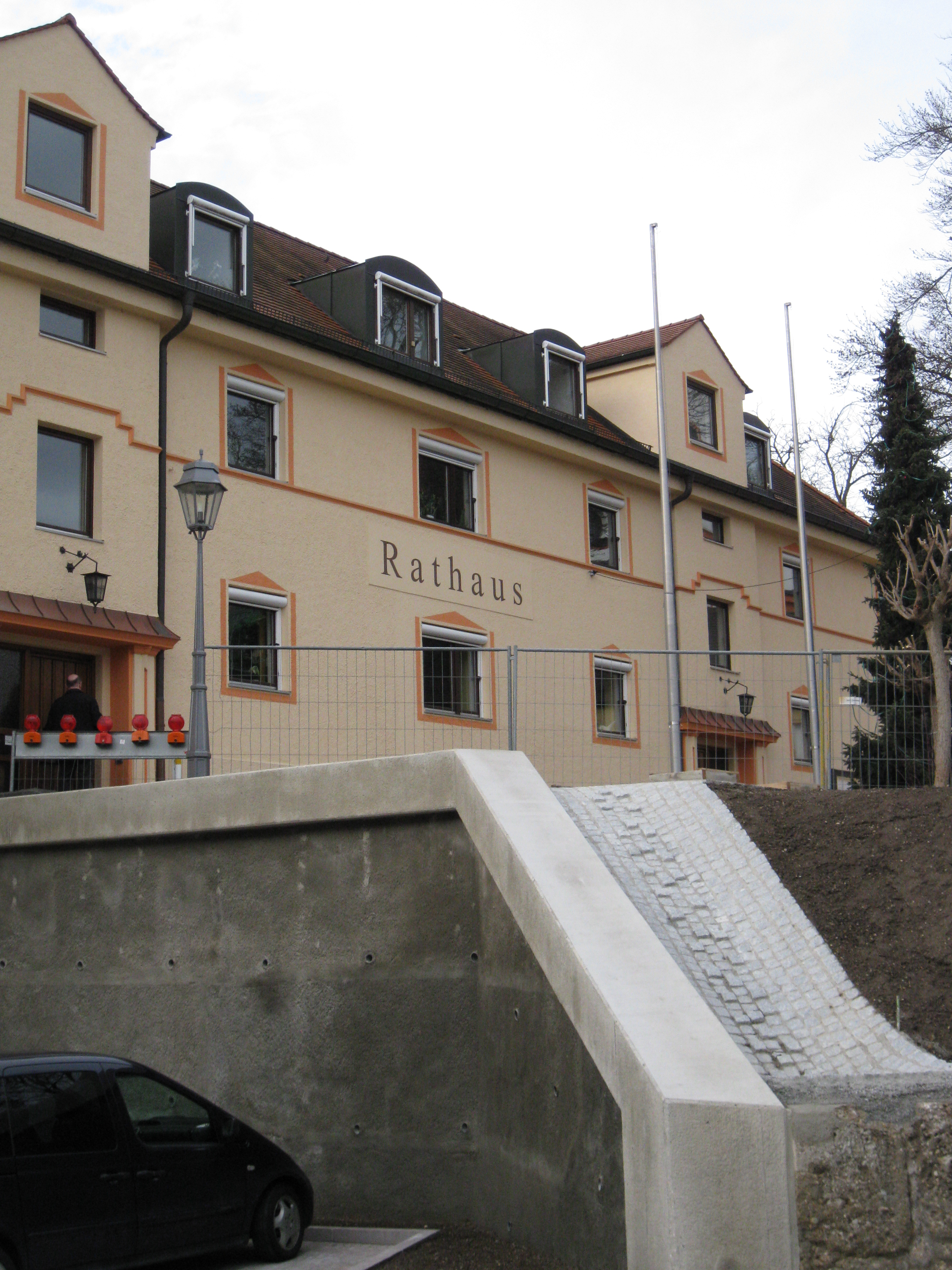 Mering in Bayern, Landkreis Aichach, unweit von Augsburg